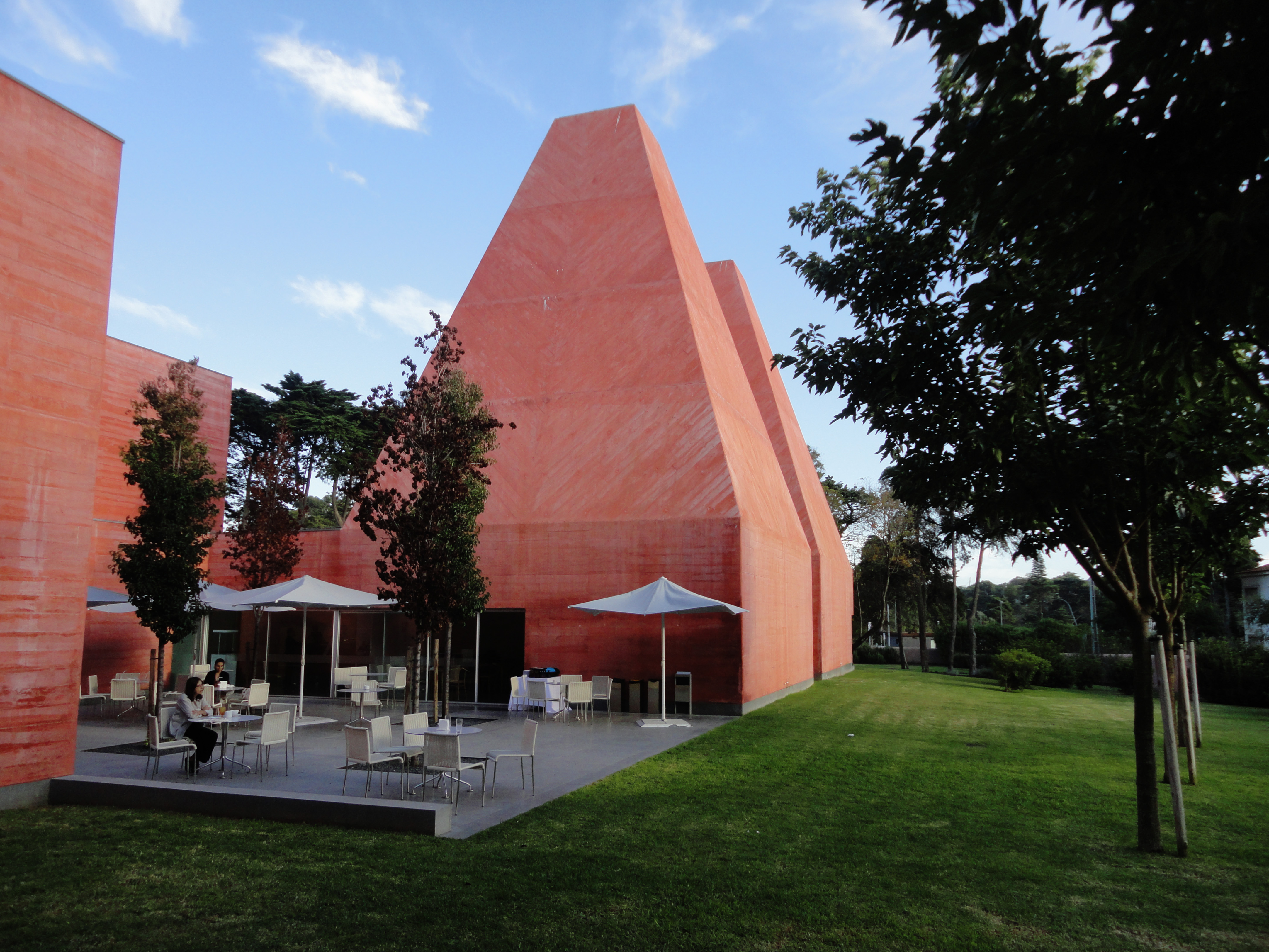 Casa das Historias Paula Rego, Cascais; Arq. Souto de Moura